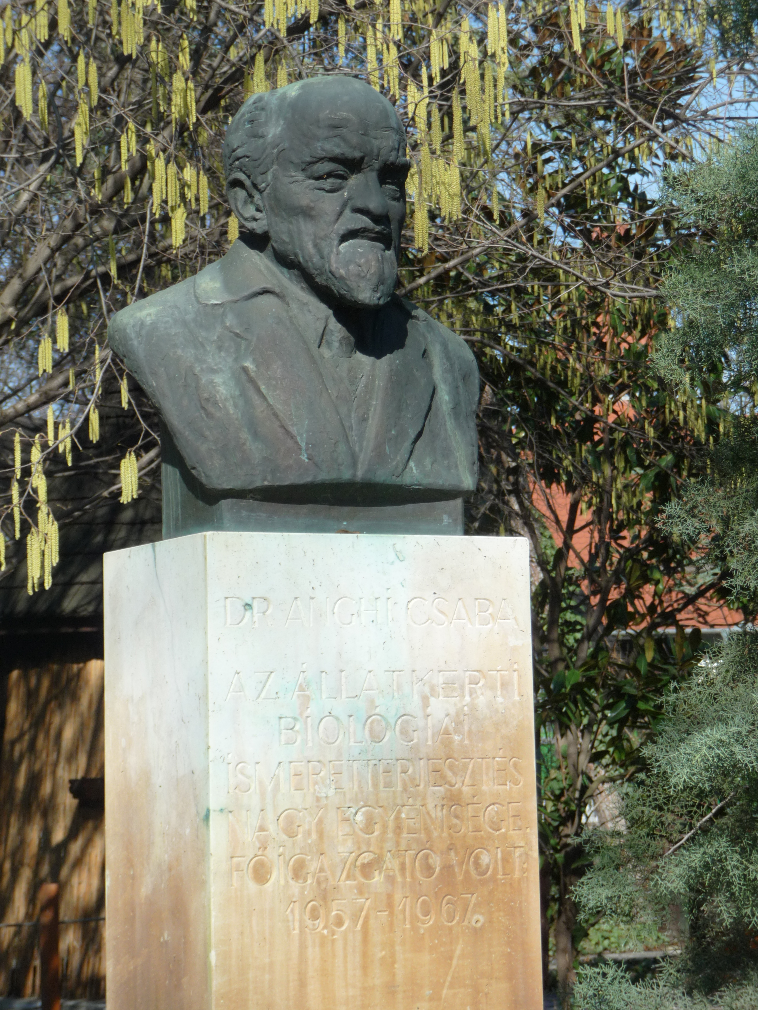 Anghi Csaba mellszobra (Búza Barna, 1986, bronz) a Fővárosi Állat- és Növénykertben (Budapest, Városliget).